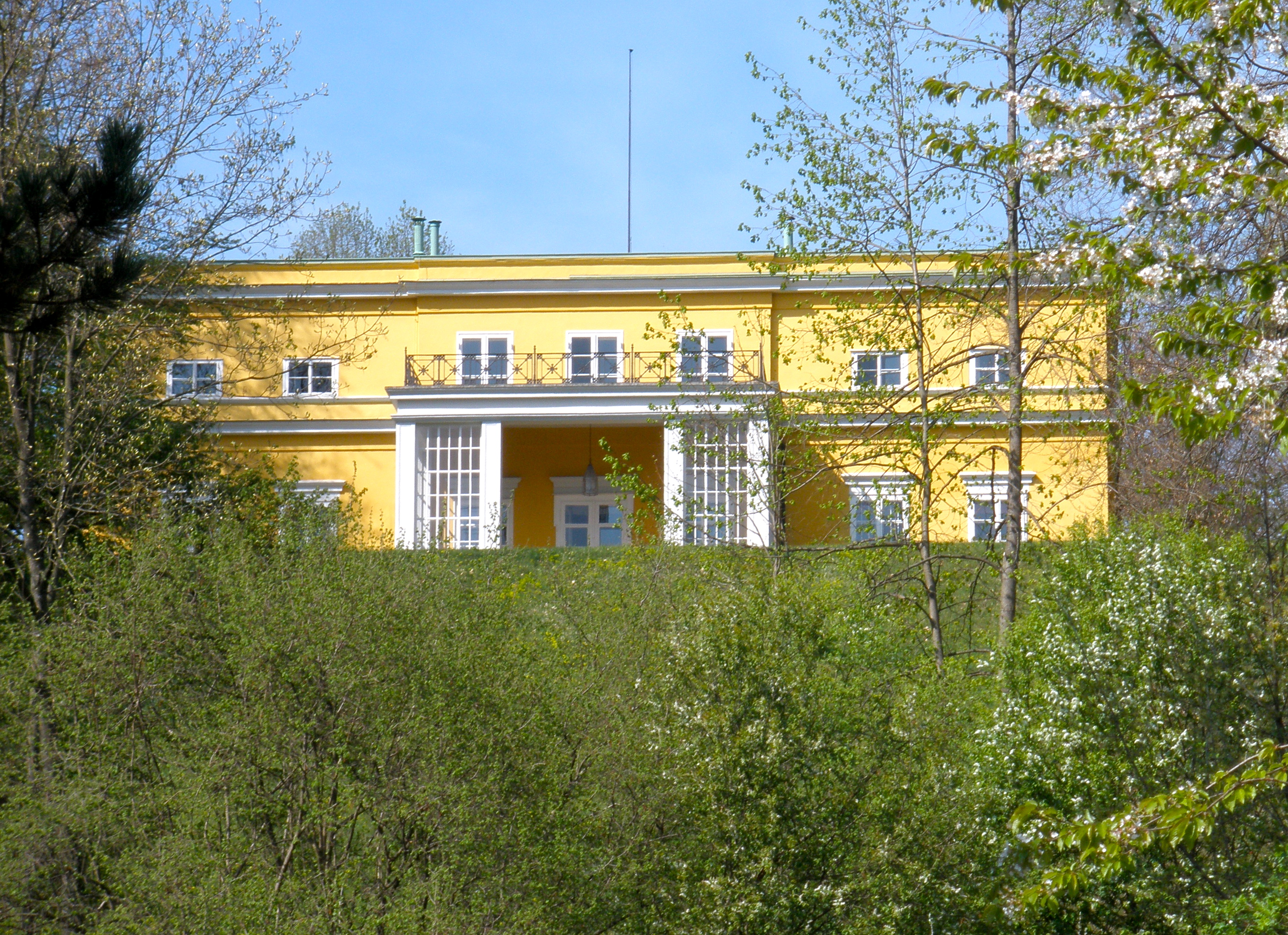 Die "Königinvilla" in Gmunden – 1838 erbaut als Villa Thun – war ab 1868 Sommerdomizil König Georgs V. von Hannover und dessen Gattin sowie deren Kinder. Nach dem Tod des Königs wählte Königin Marie die Villa Thun als Witwensitz. Die "Königinvilla" ist immer noch im Besitz des Hauses Hannover.